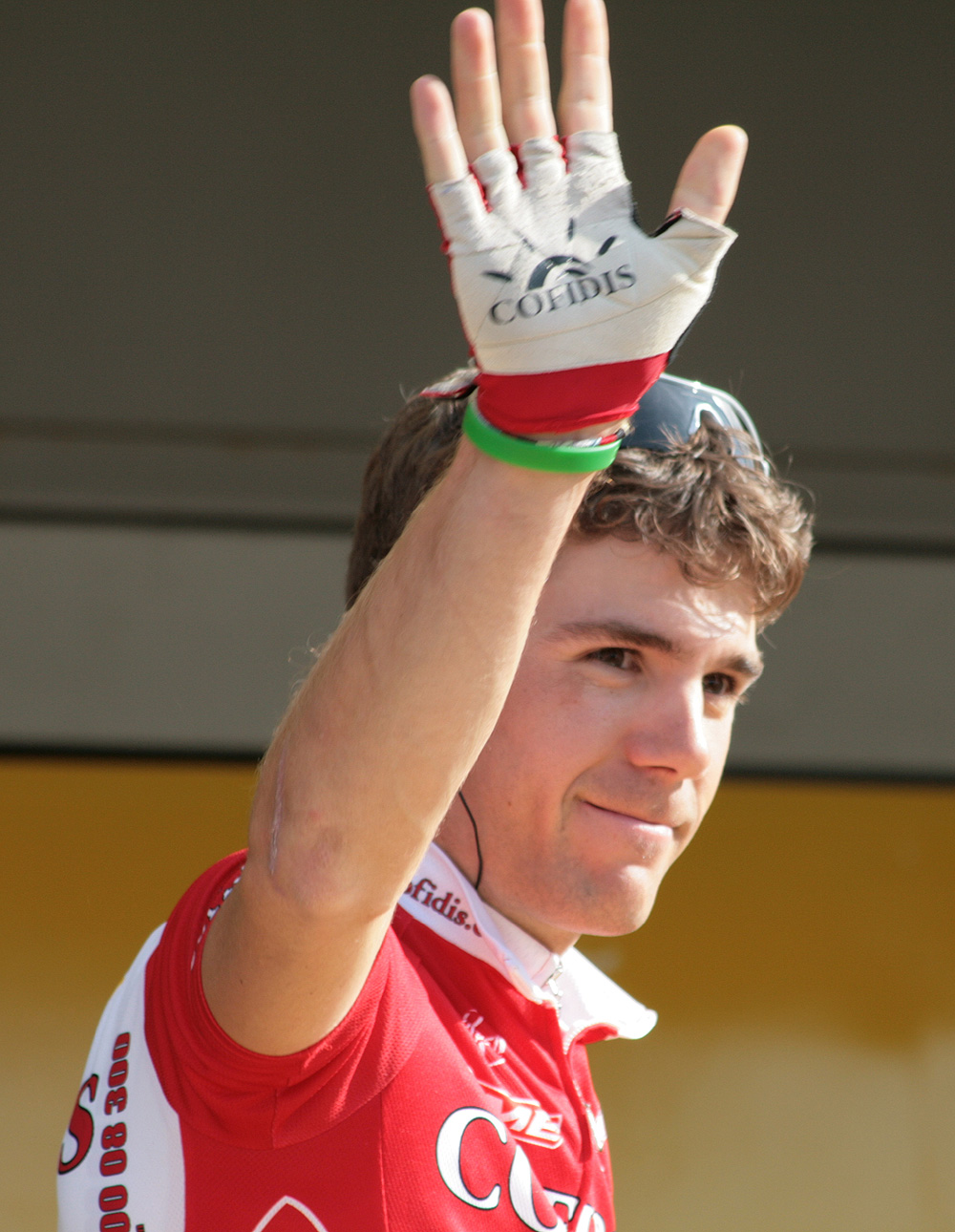 Maxime Monfort voor Luik-Bastenaken-Luik 2008